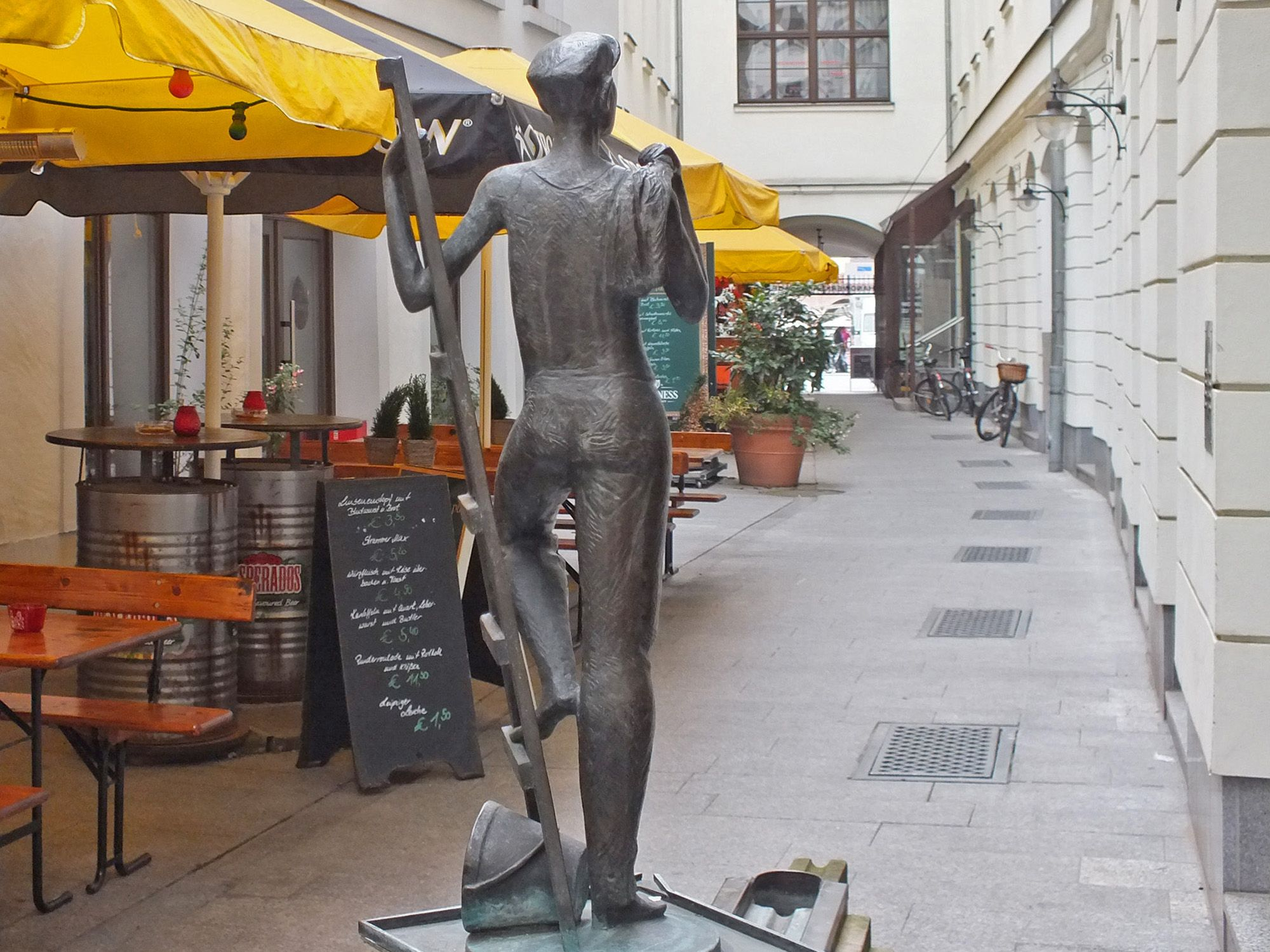 Die Handwerker-Passage in Leipzig mit dem Fensterputzerbrunnen.